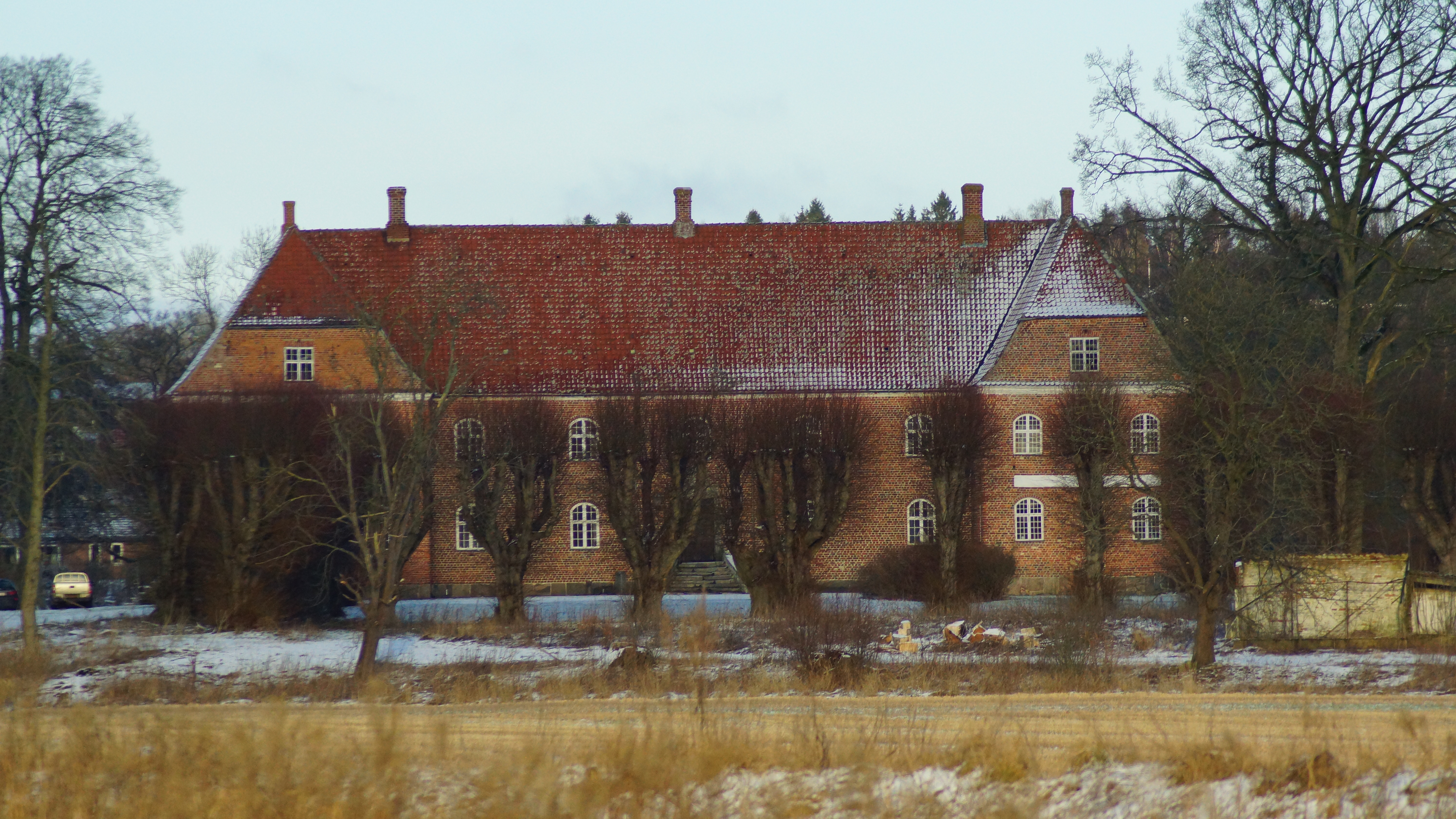 Gl. Ryomgård2